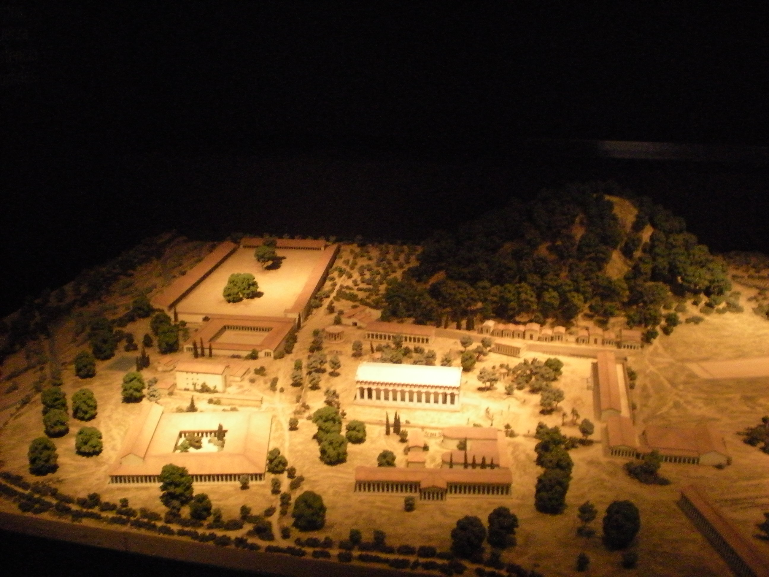 Maqueta arquitectónica del recinto del santuario de Olimpia, en Grecia. Pertenece a la exposición La belleza del cuerpo, en el MARQ. Forma parte de la exposición permanente del Museo Británico.